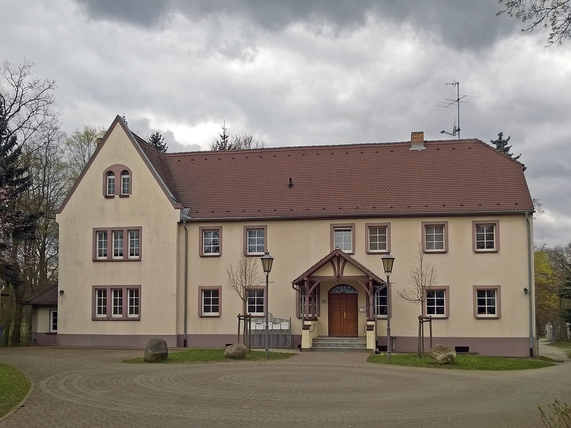 Herrenhaus Wilhelmsfeld, OT von Kringelsdorf